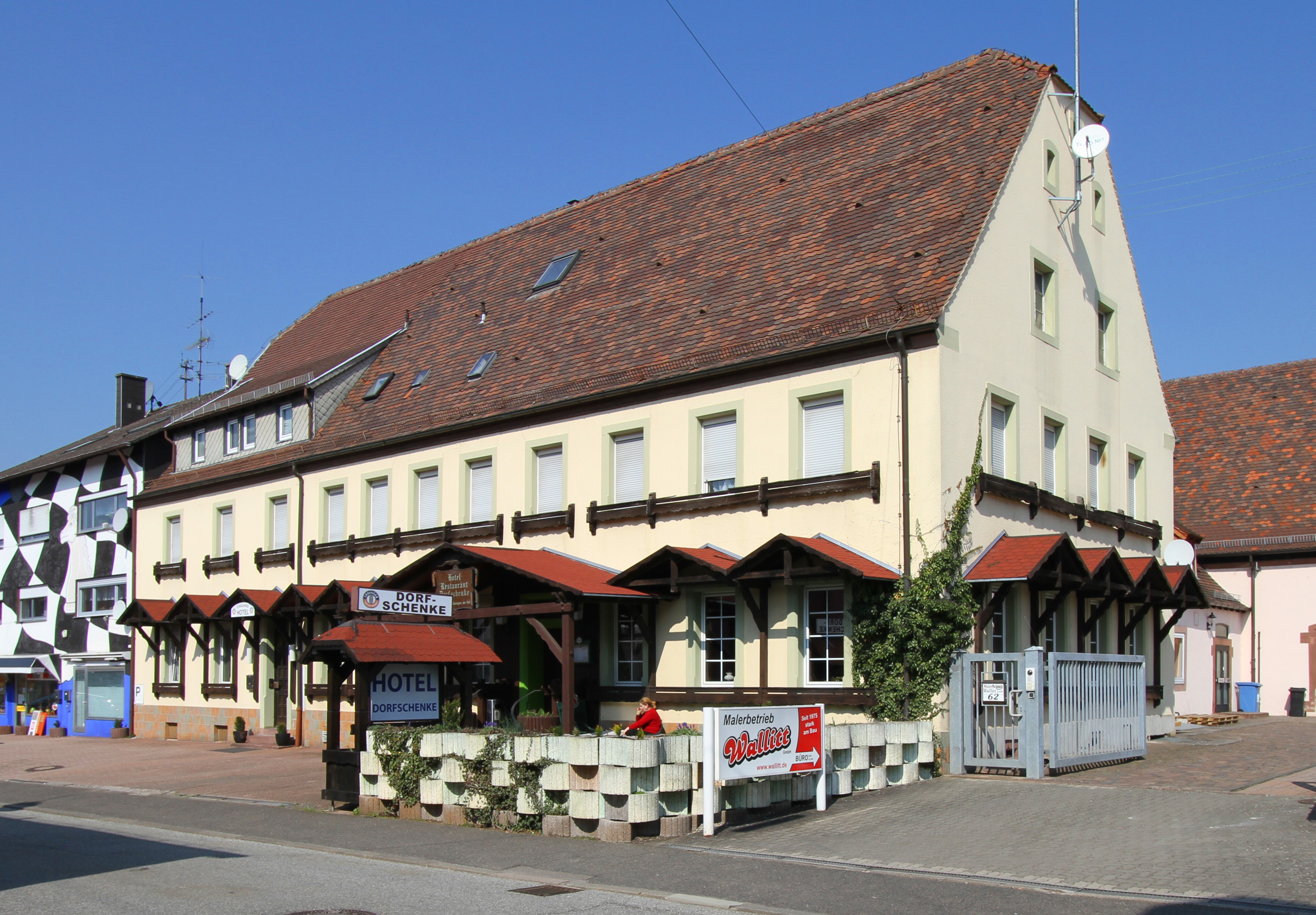 Hotel in Pirmasens-Winzeln